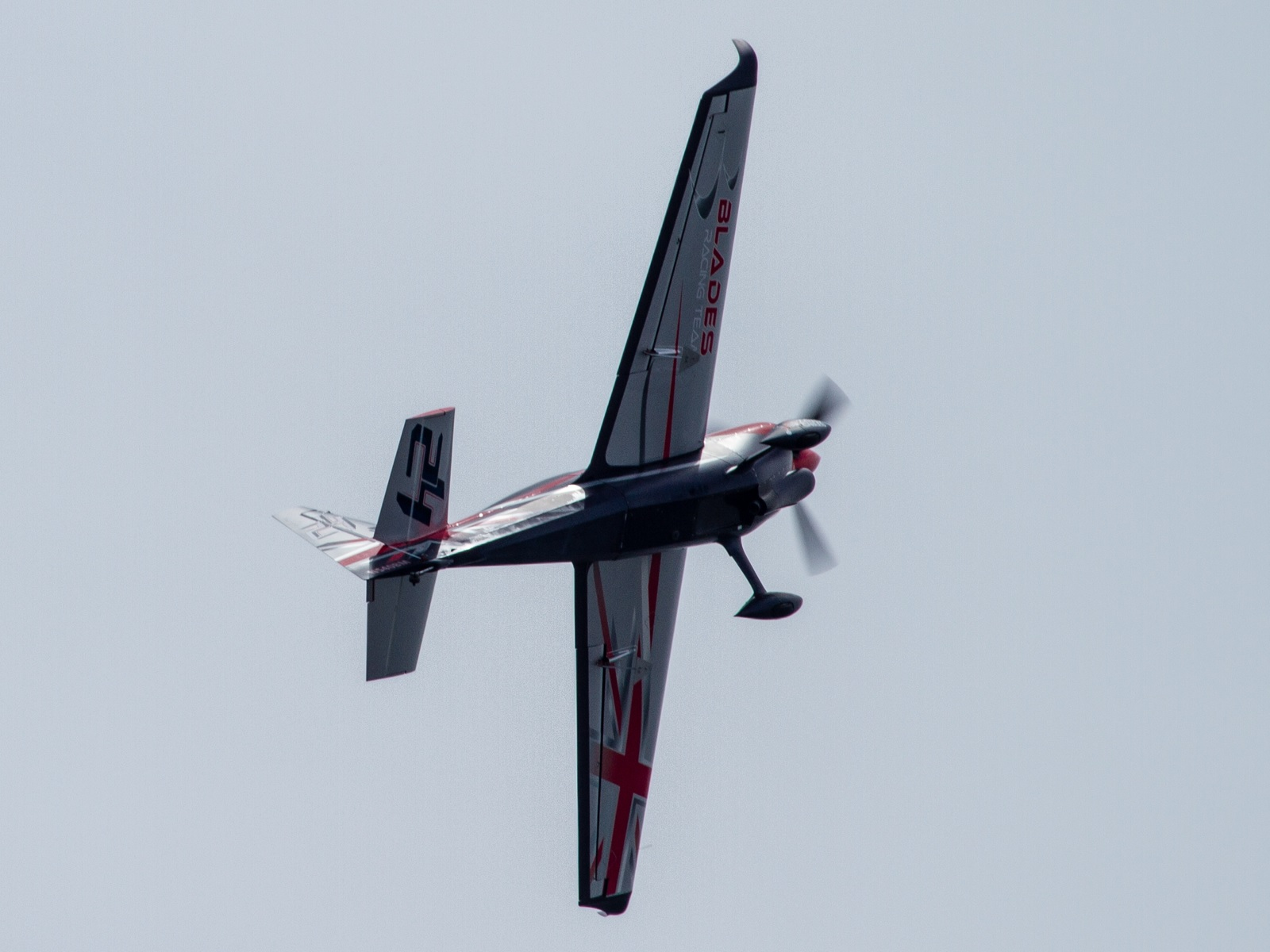 2018年レッドブル・エアレース・ワールドシリーズ 千葉 ベン・マーフィー